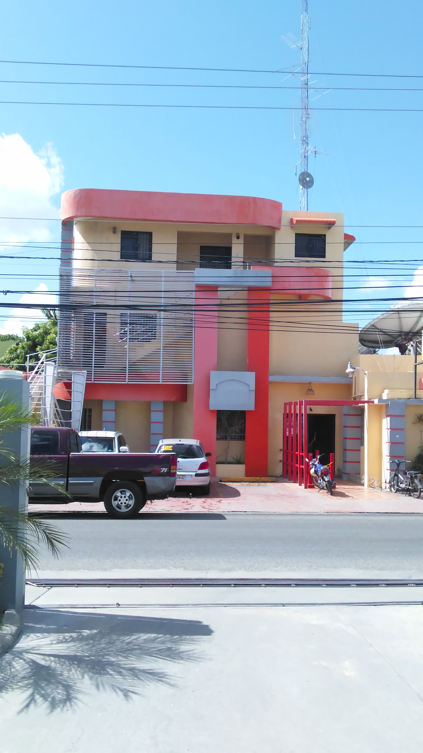 Edificio de Trebol Cable